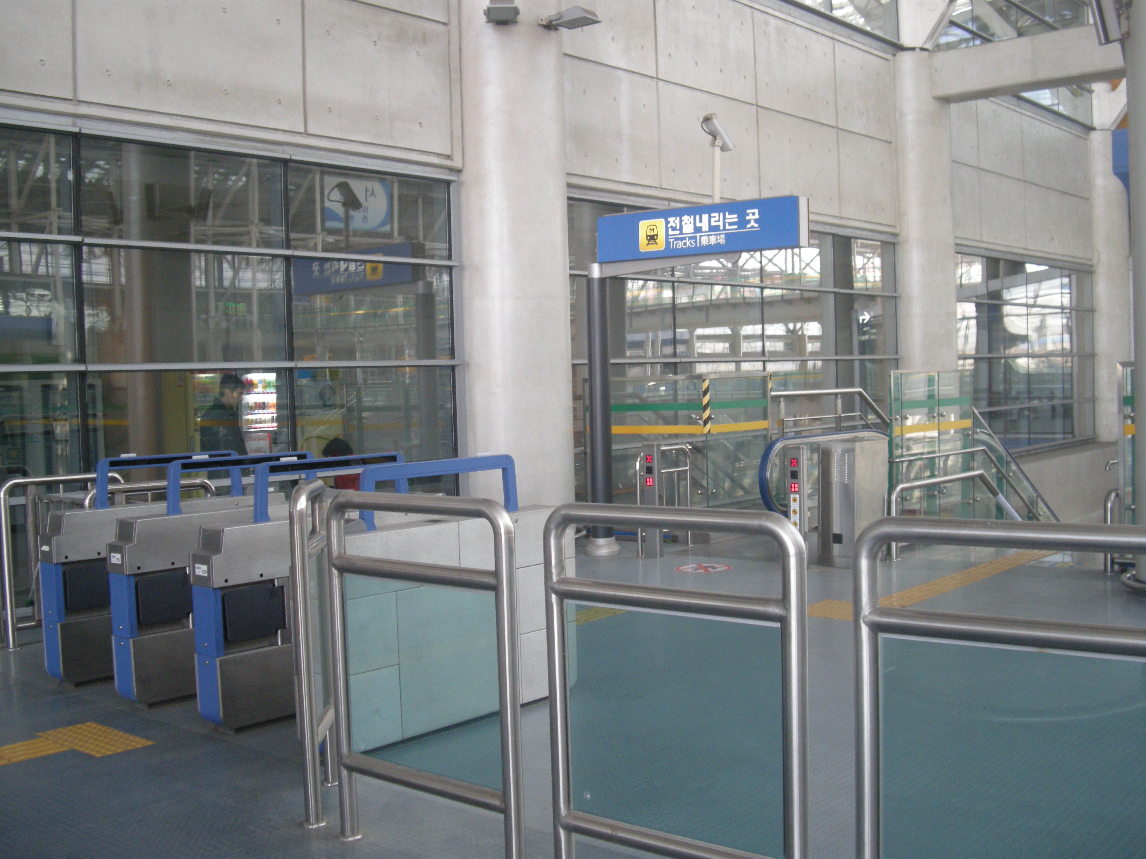 수도권 전철 1호선 광명역 하차 게이트